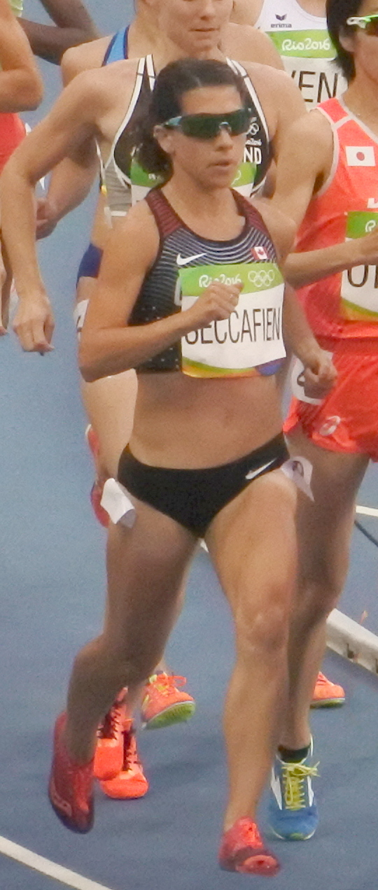 Rio 2016 - Eliminatórias 5000m Feminino